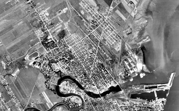 Vue aérienne de Limoilou en 1948, extrait de la Mosaïque d’orthophotographies de 1948 du Centre Géo/Stat de l’Université Laval